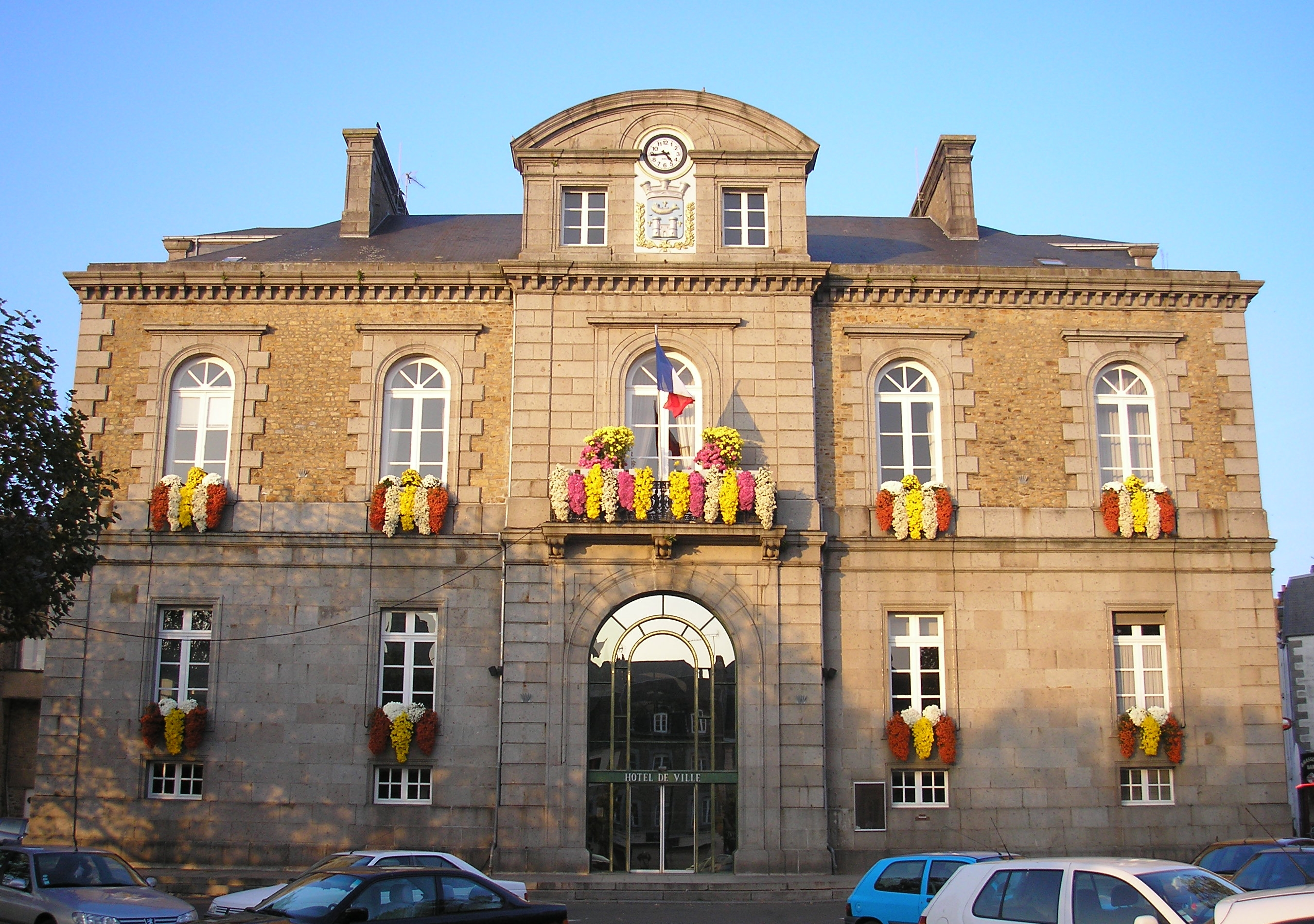 Avranches (Normandie, France). L'hôtel de ville.